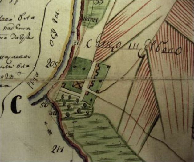 Одно из первых упоминаний Щербова.